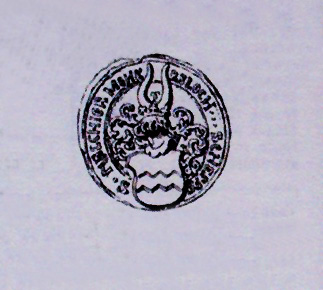 Siegel des Schöffen Melchior Kleingedank, genannt Mommersloch. Köln 1547, nach Anton Fahne, Köln 1848